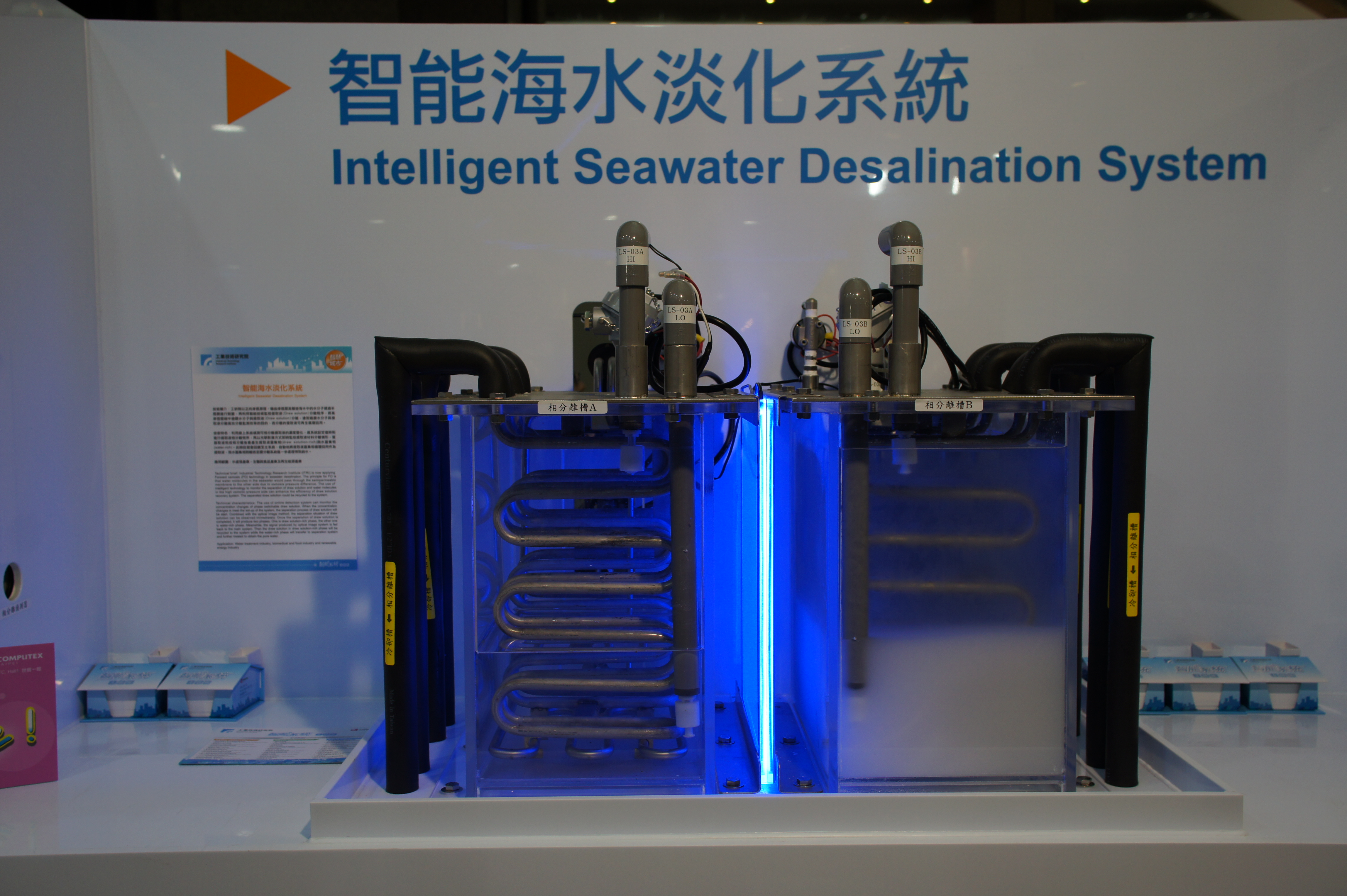 2017台北國際電腦展，工業技術研究院智能海水淡化系統。